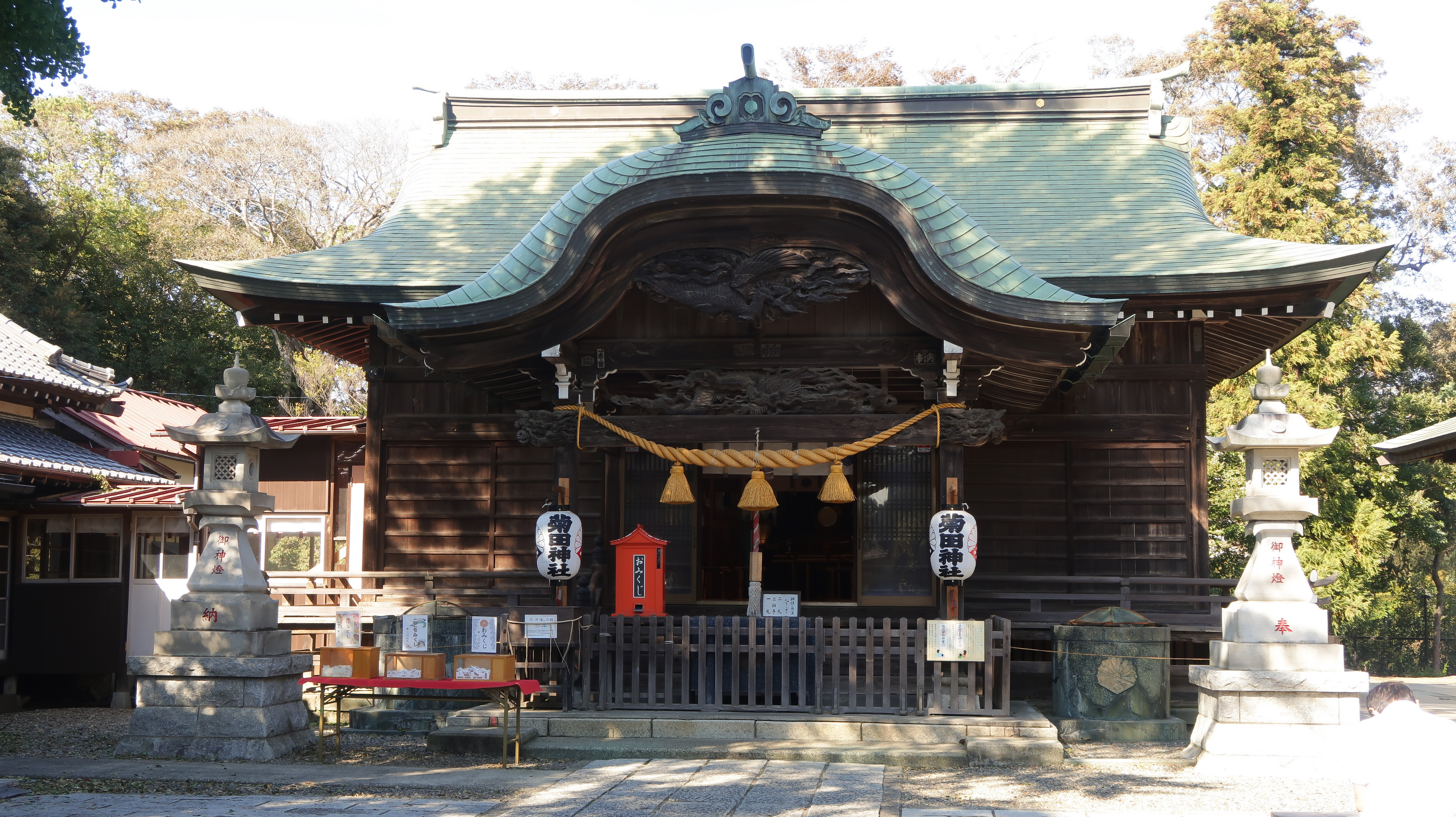 菊田神社（千葉県習志野市津田沼）